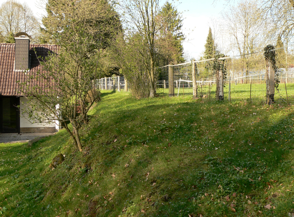 Wallböschung der Alten Bückeburg in Obernkirchen